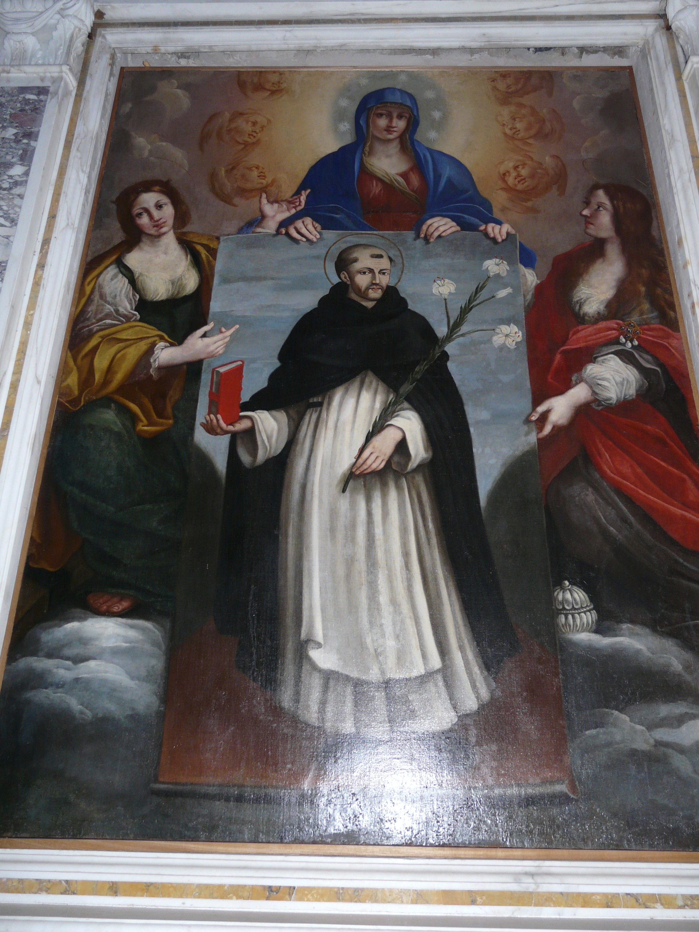 Oratorio dei Bianchi, Fosdinovo, Toscana, Italia